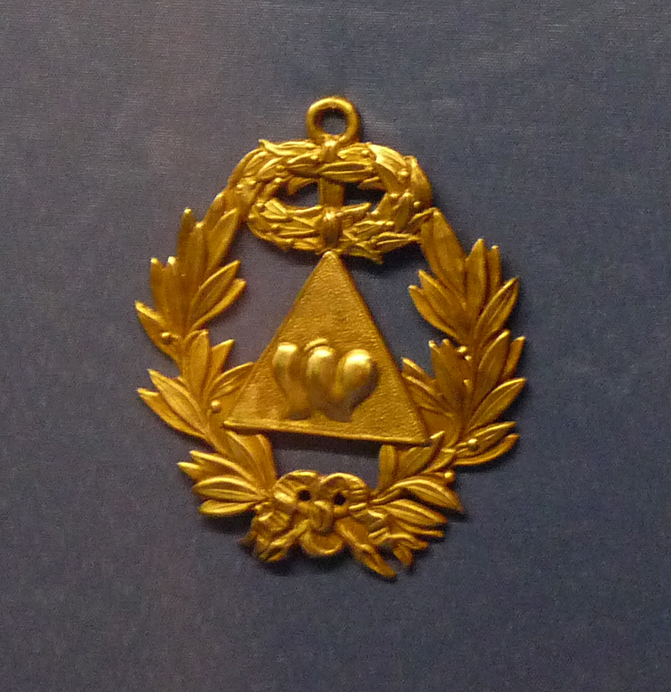 Franc-maçonnerie à Strasbourg : bijou de la loge de la Vraie Fraternité (1803-1841), en métal doré